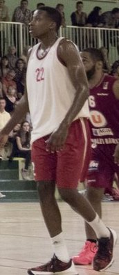 regardsphotobressuire.fr/